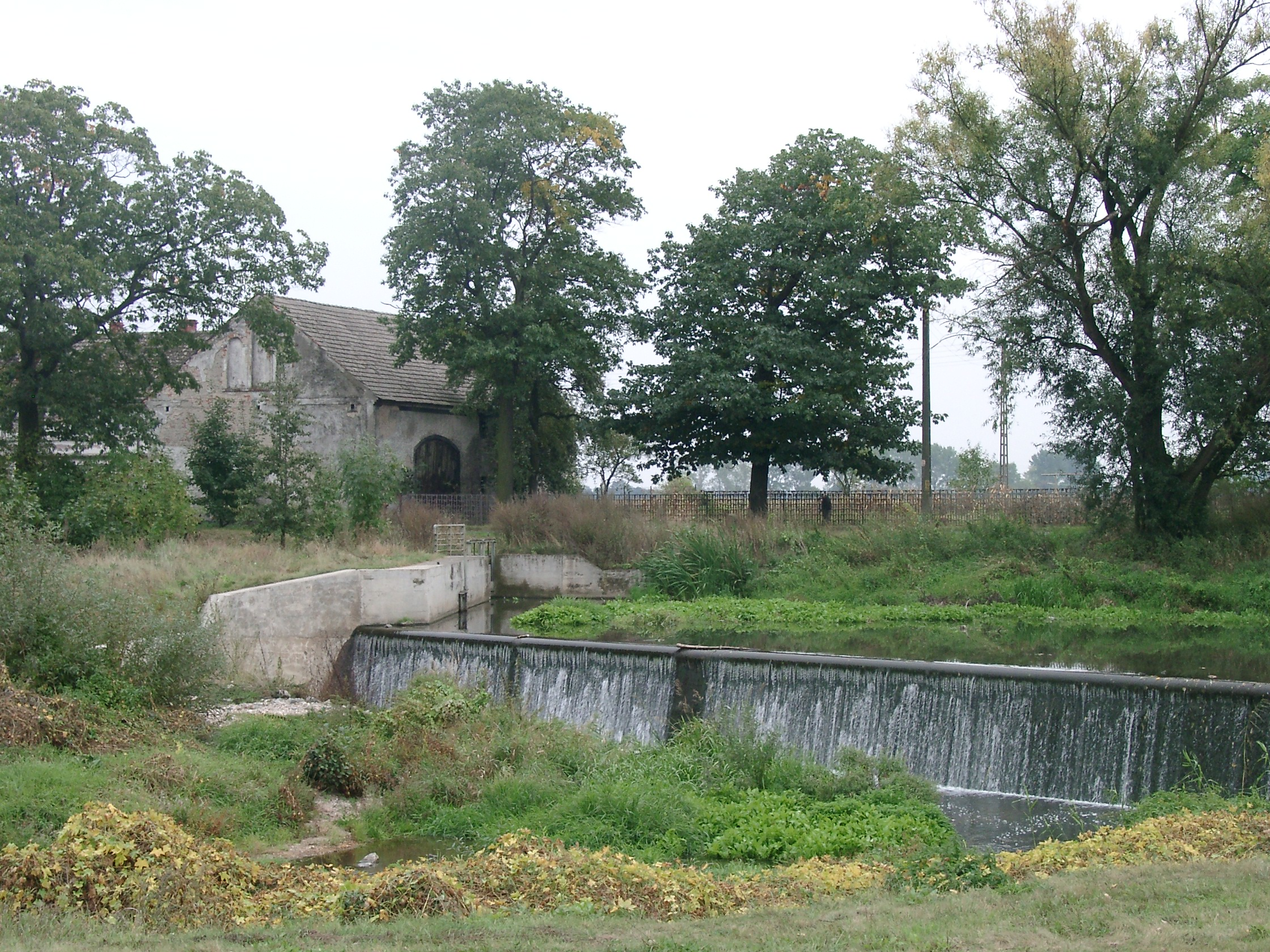 Rzeka Skora w Goliszowie koło Chojnowa (Polska). Skora river in Goliszów near Chojnów, Poland.